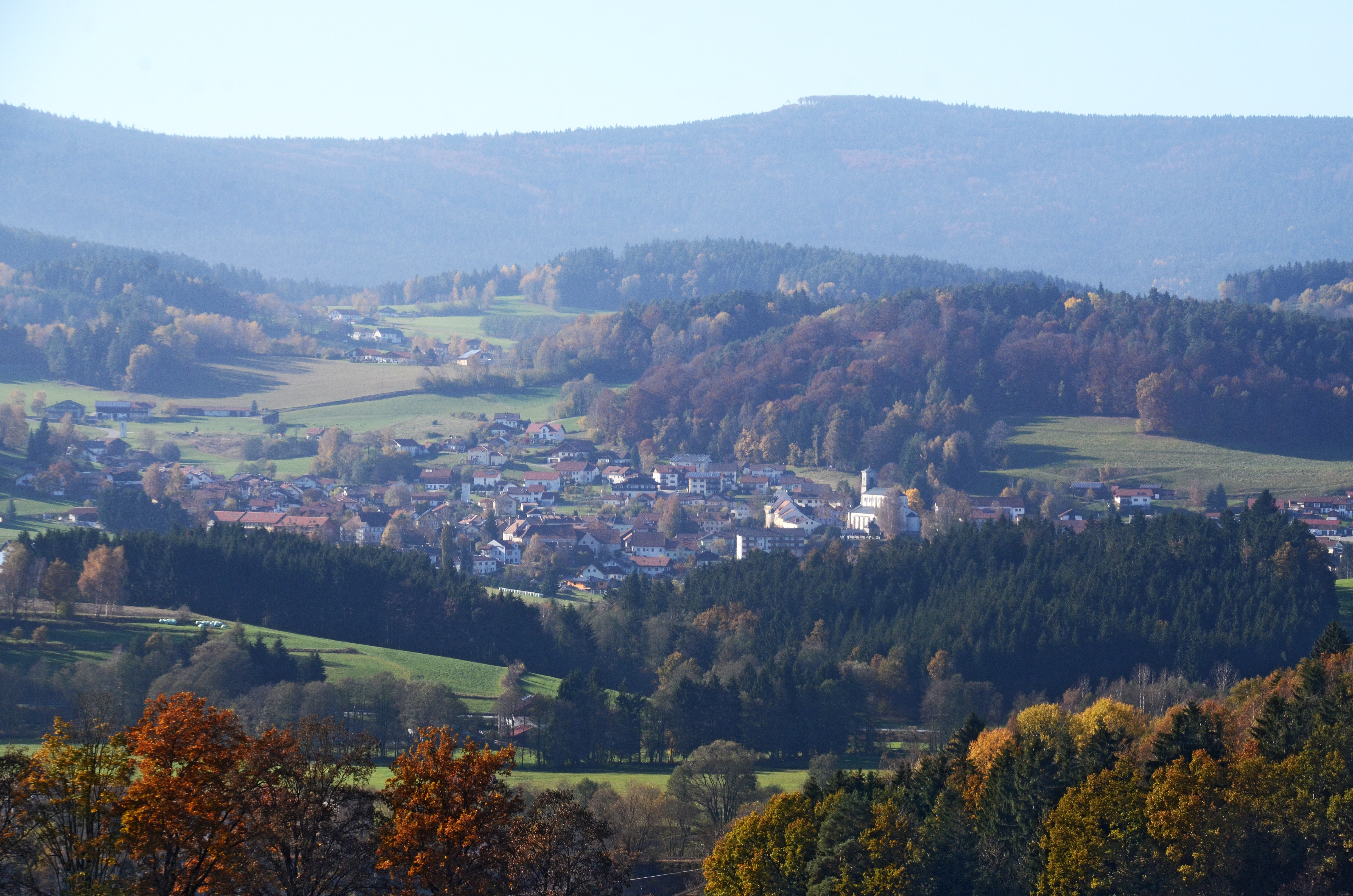 Gotteszell unter dem Hirschenstein